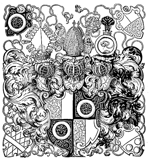 Hugo Gerhard Ströhl: "Heraldischer Atlas". Stuttgart 1899. Tafel 43, Nr. 6, Wappen Johann Egenolph von Knöringen, Bischof von Augsburg, von Jost Amman